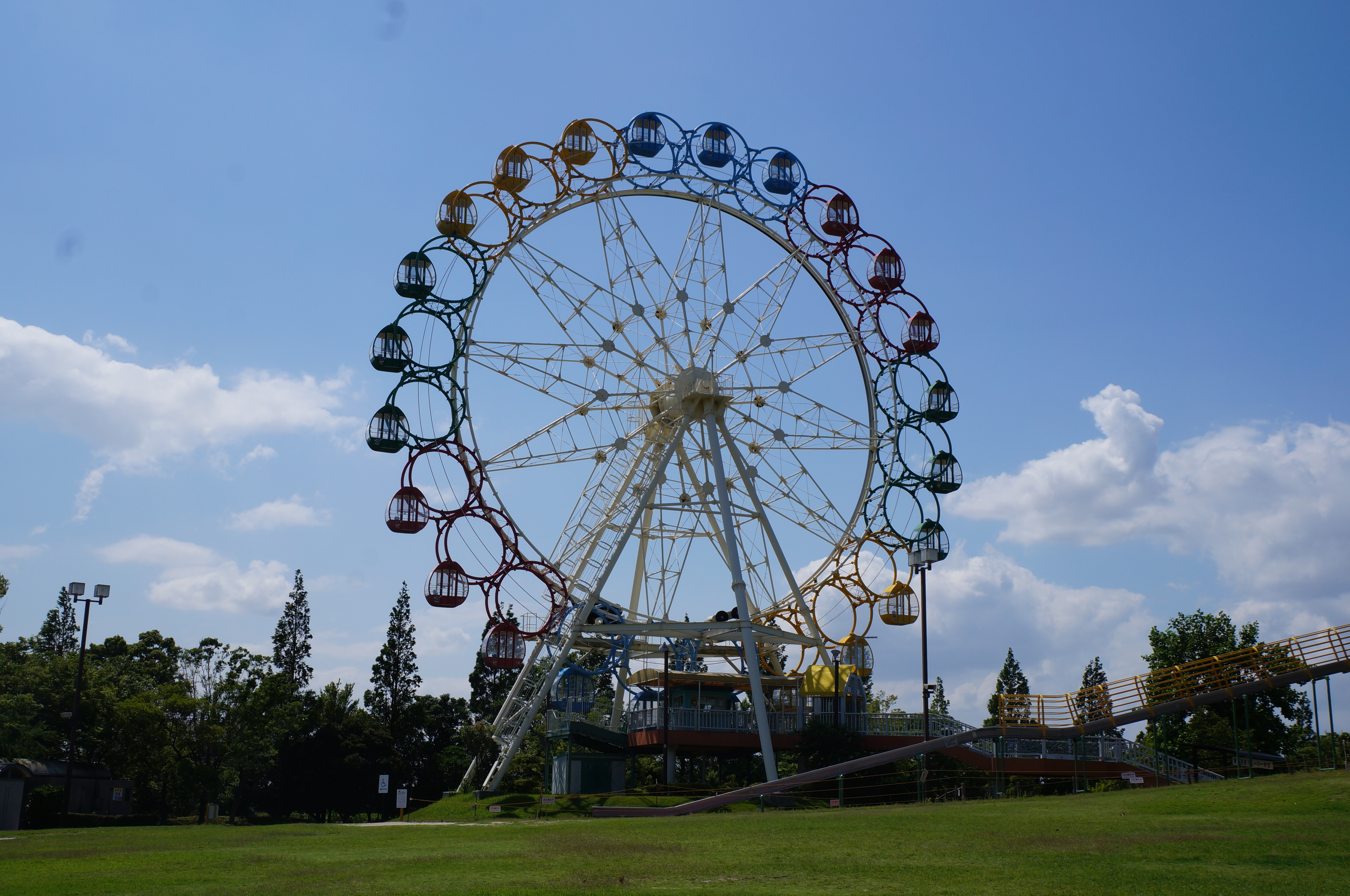 堀内公園の観覧車